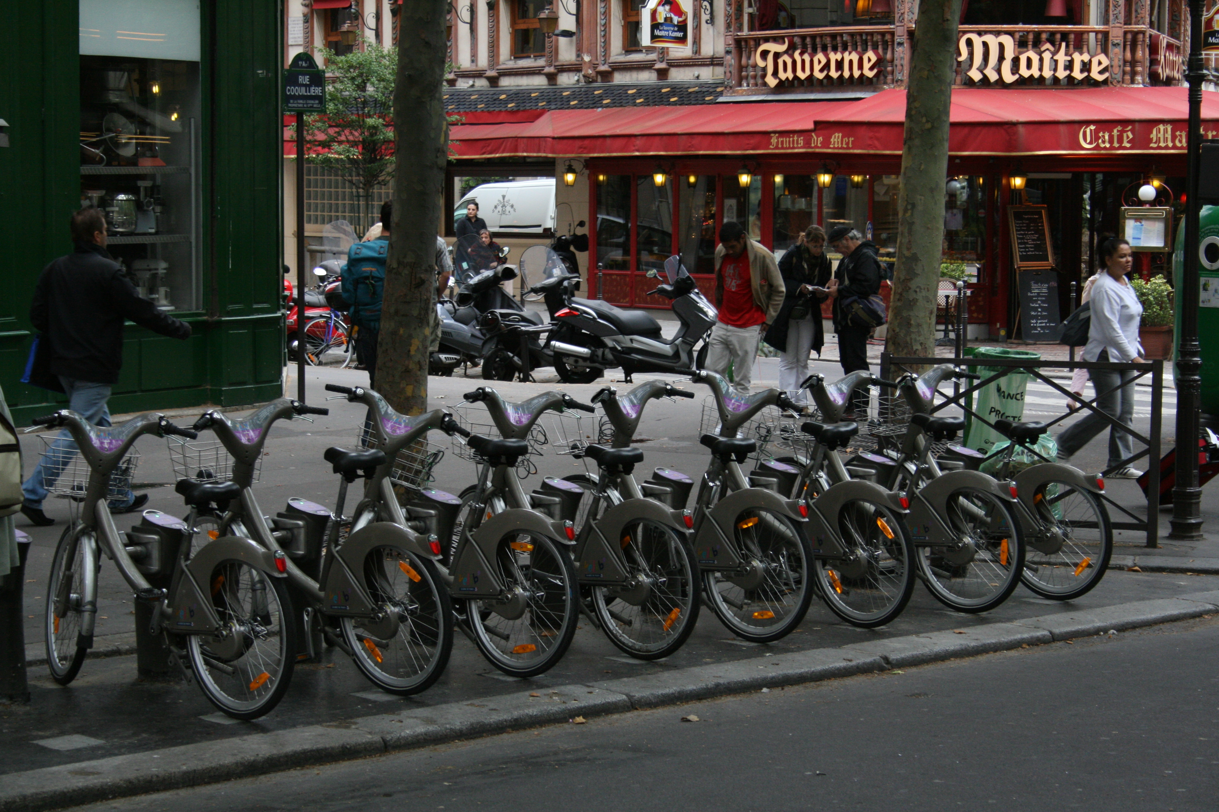 Vélib', rue Coquillière, Paris Ier arrondissement.